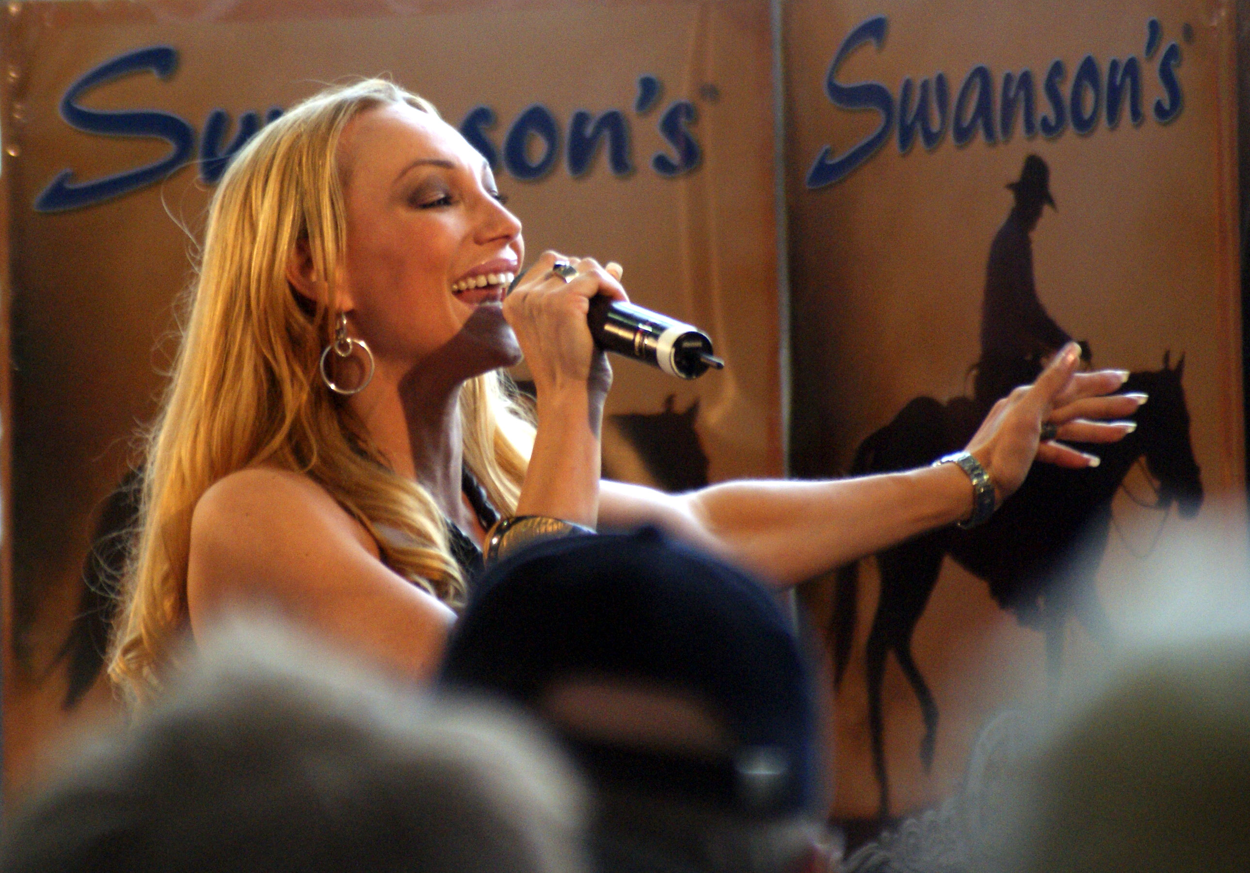 Charlotte Perrelli Sjunger på Överby Köpcenter i Trollhättan, 5 april 2008.